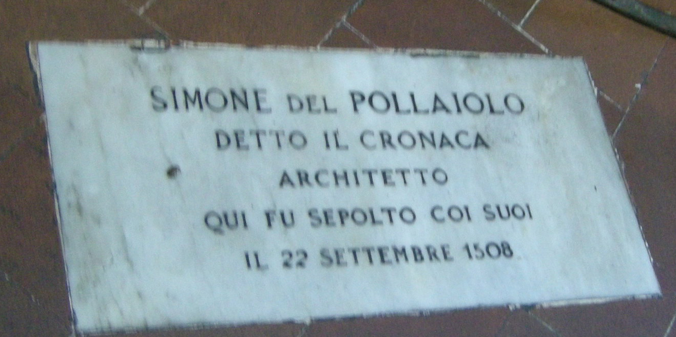 Sant'ambrogio, firenze, tomba simone del pollaiolo detto il cronaca